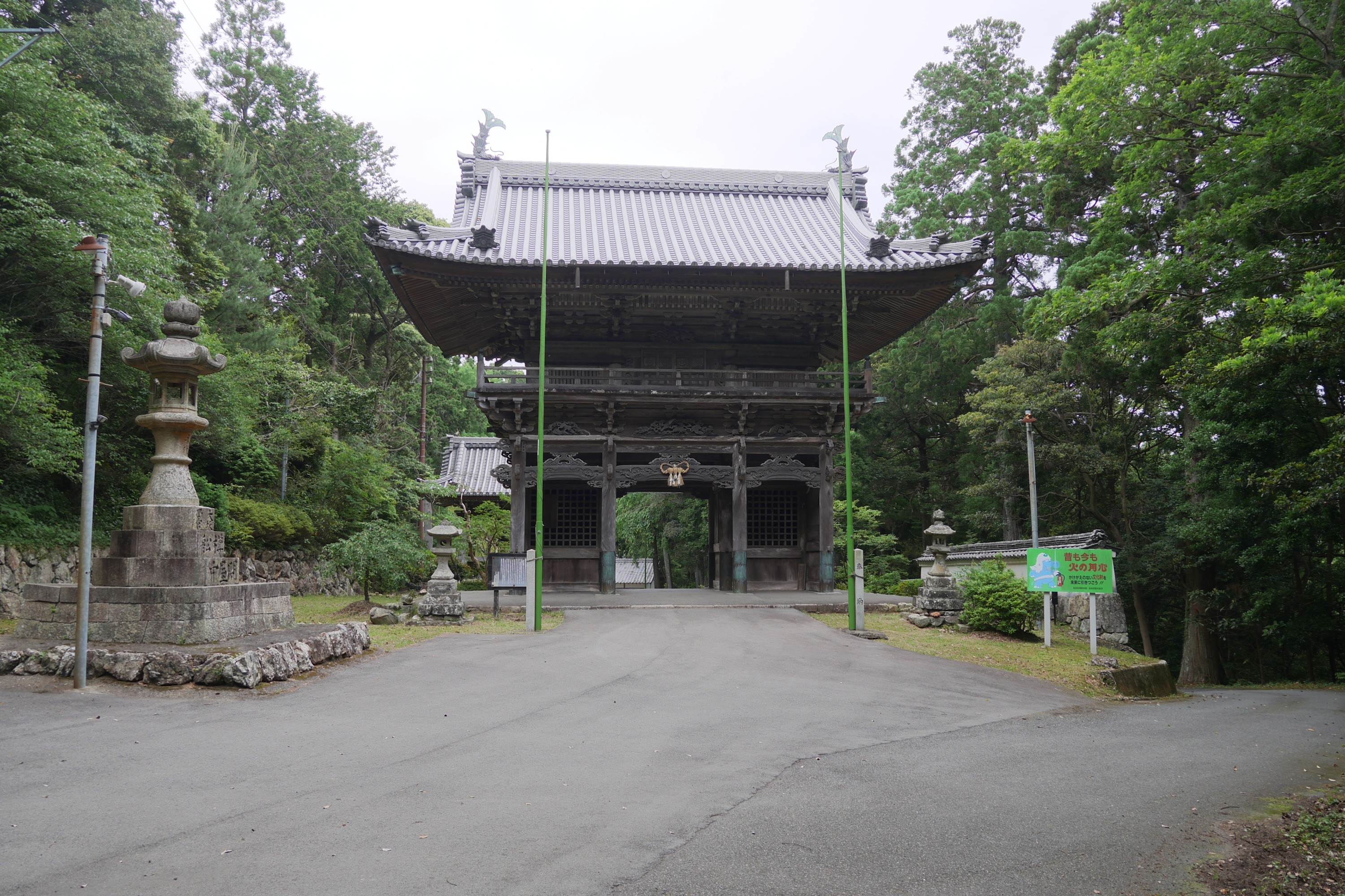 日本の三重県鳥羽市にある正福寺（しょうふくじ）の大門（山門）。